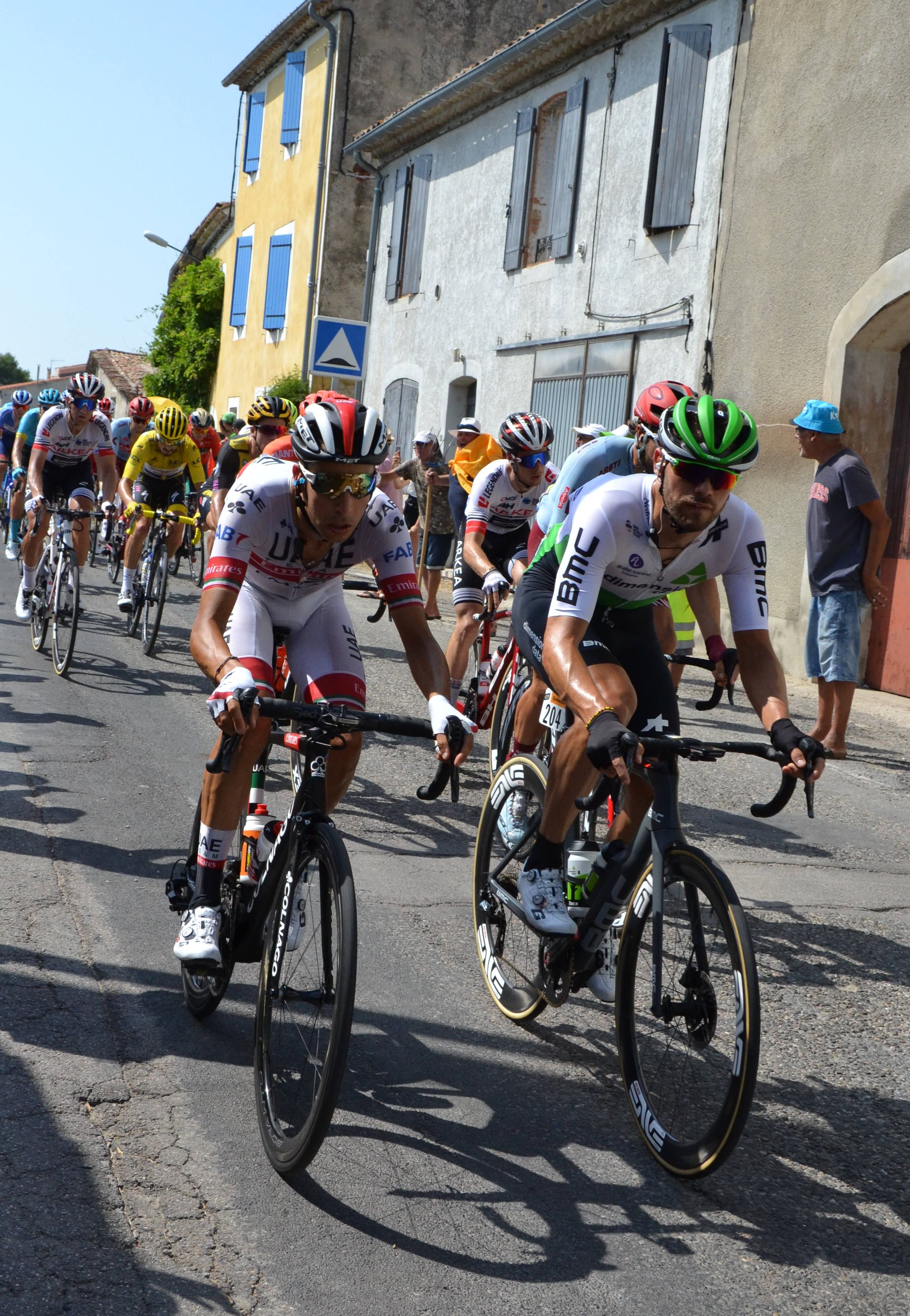 Passage du peloton à Lédignan avec au fond le maillot jaune Julian Alaphilippe.